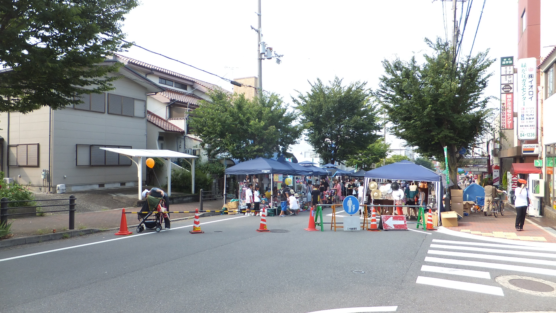 三木さんさん祭り 通行止め標識